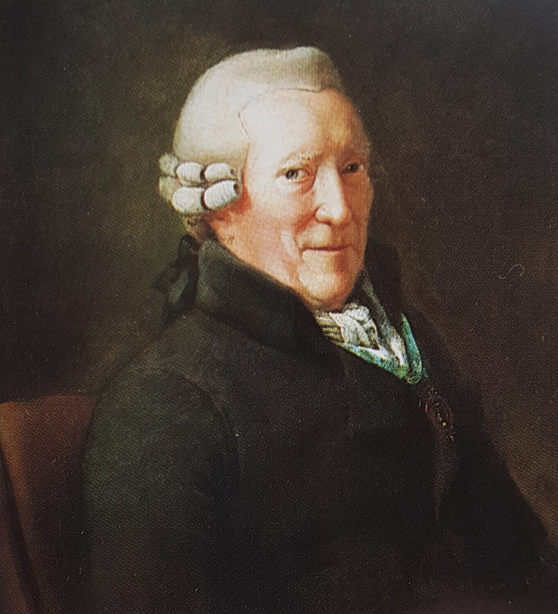 Anders Reimers porträtterad av Per Krafft dy